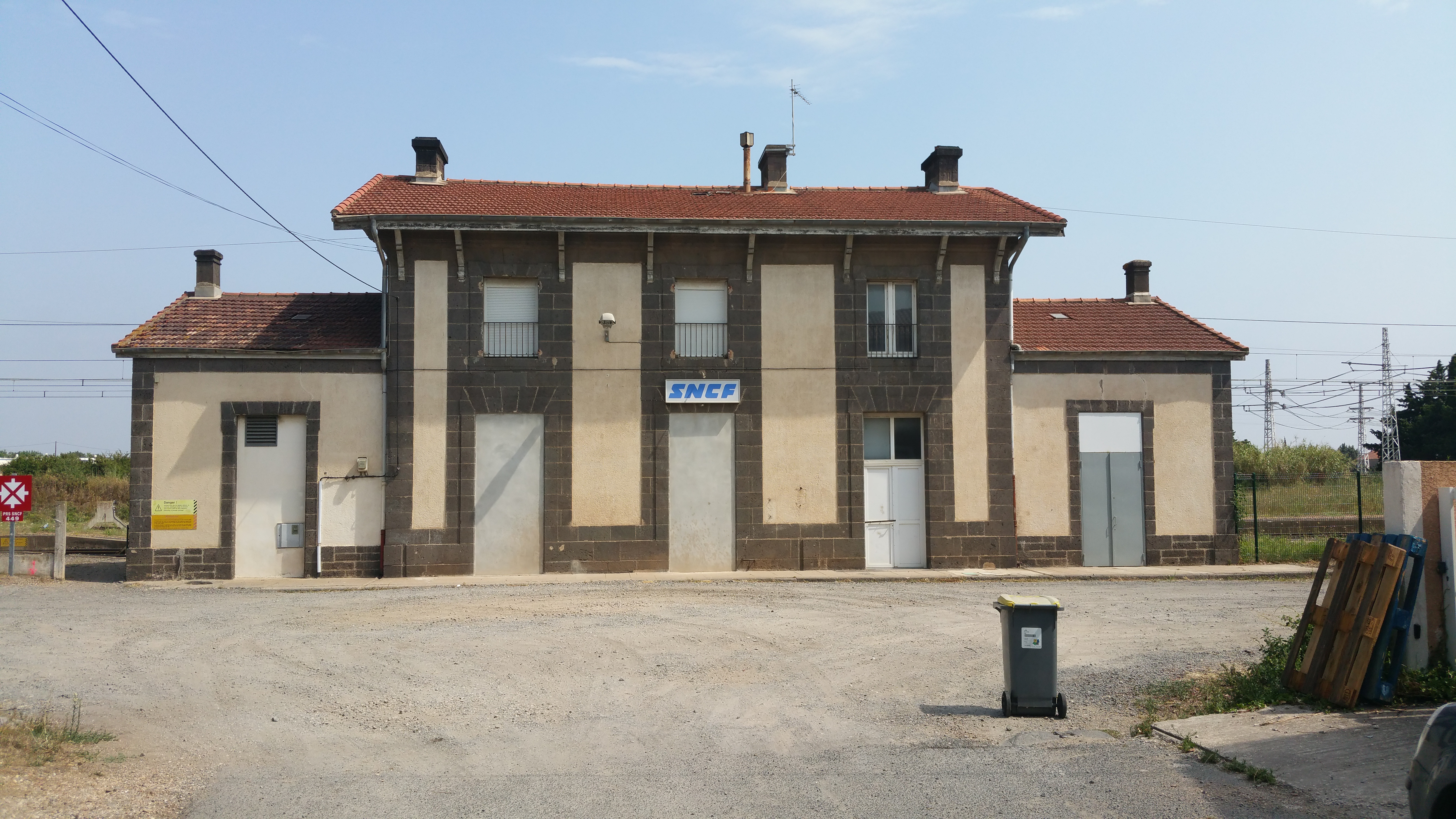 Vue de la gare de Vias en Juillet 2015.